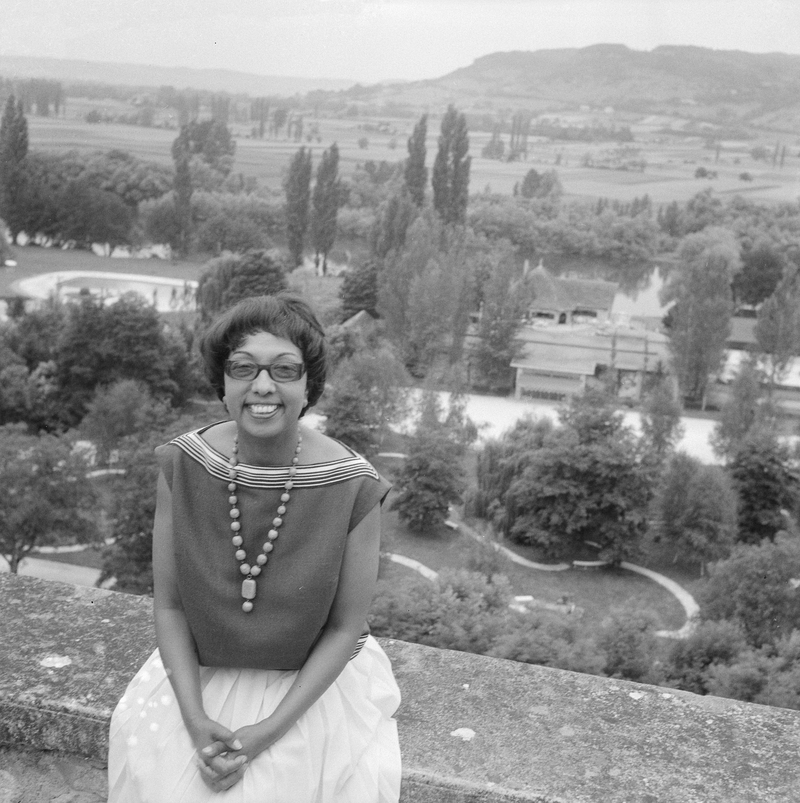 Collectie / Archief : Fotocollectie Anefo Reportage / Serie : [ onbekend ] Beschrijving : Afhalen van Josephine Baker in Frankrijk. Josephine in haar tuin Les Milandes Datum : 26 juni 1961 Locatie : Frankrijk Trefwoorden : tuinen Persoonsnaam : Baker, Josephine Fotograaf : Nijs, Jac. de / Anefo Auteursrechthebbende : Nationaal Archief Materiaalsoort : Negatief (zwart/wit) Nummer archiefinventaris : bekijk toegang 2.24.01.03 Bestanddeelnummer : 912-6479